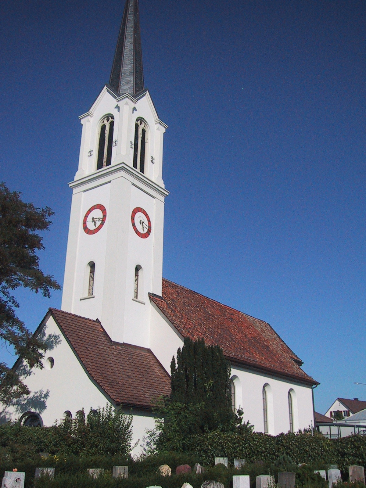 Kirche Scherzingen, Gemeinde Münsterlingen, Kanton Thurgau